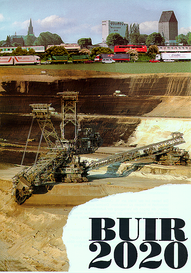 Fotomontage „Buir 2020“, Teil eines Flugblatts von 1994, Protest gegen den Rheinbraun-Tagebau Hambach. – Die Fotomontage zeigt einen Schaufelradbagger im Tagebau, die verlegte sechsspurige Autobahn 4, die Bahnlinie mit drei Gleisen und eine Kohlebahn vor der Kulisse Buirs.